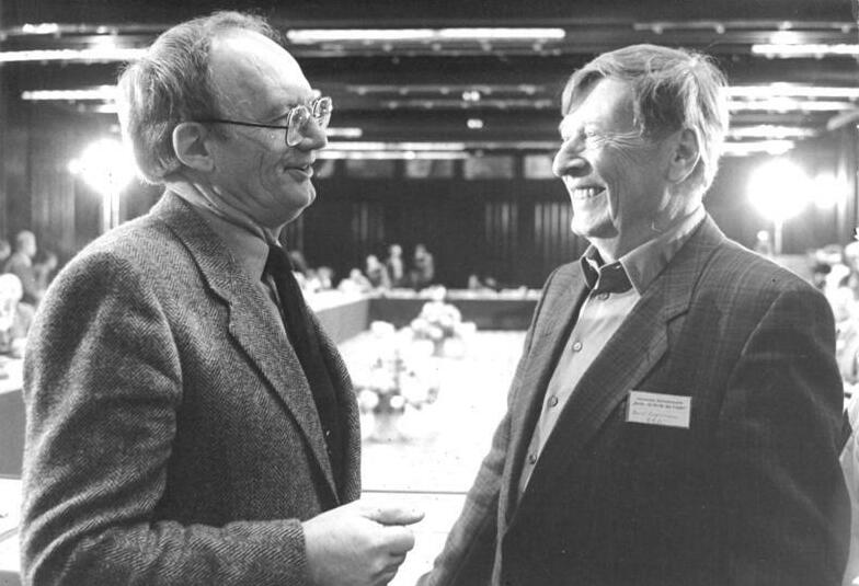 ADN-ZB Senft 14.7.87 Berlin: Internationales Schriftstellergespräch "Berlin - ein Ort für den Frieden" im Mai 1987. Unter den Teilnehmern waren Hermann Kant, Präsident des Schriftstellerverbandes der DDR, und der BRD-Schriftsteller Bernt Engelmann (r.).